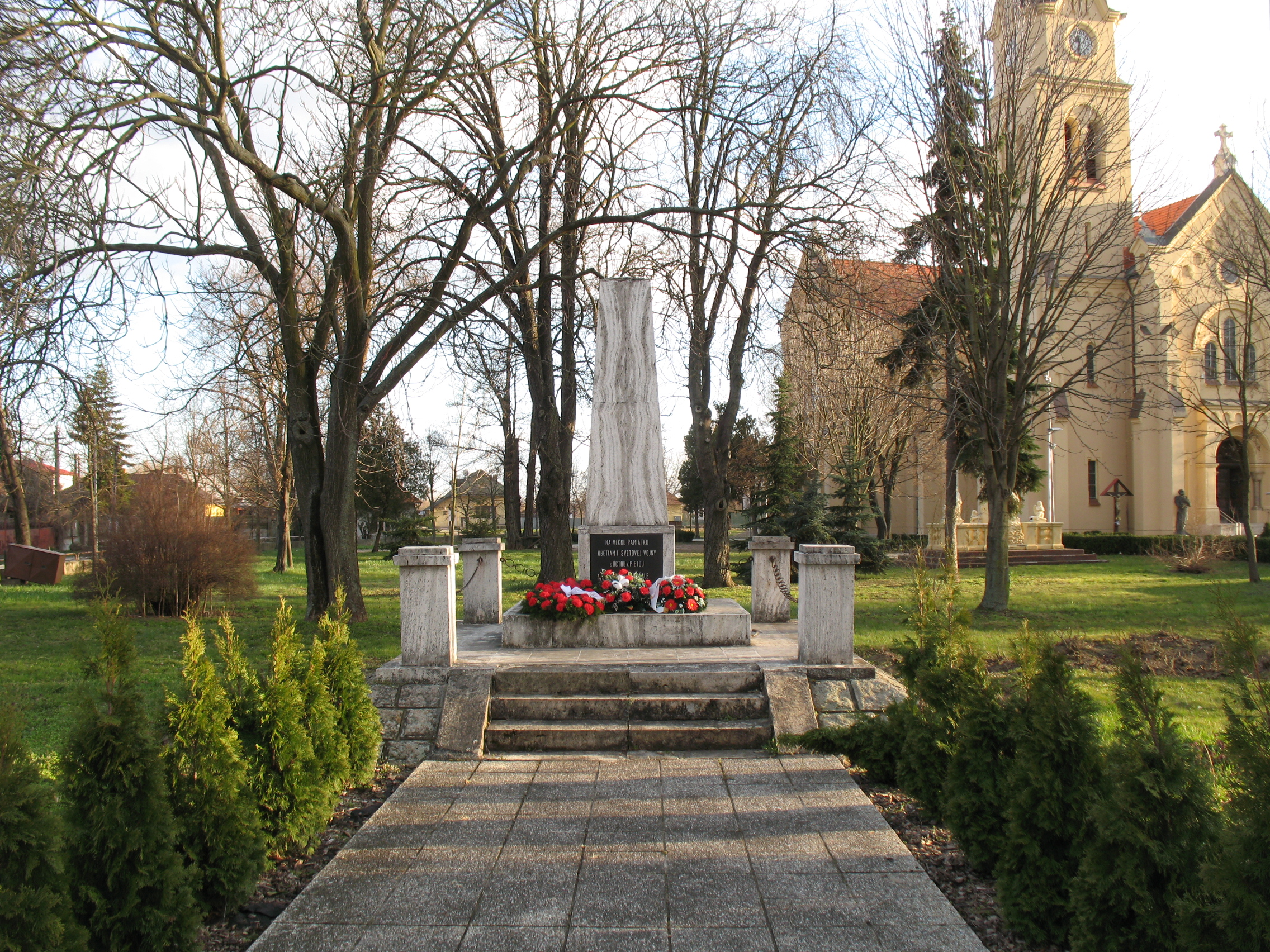 Verebély